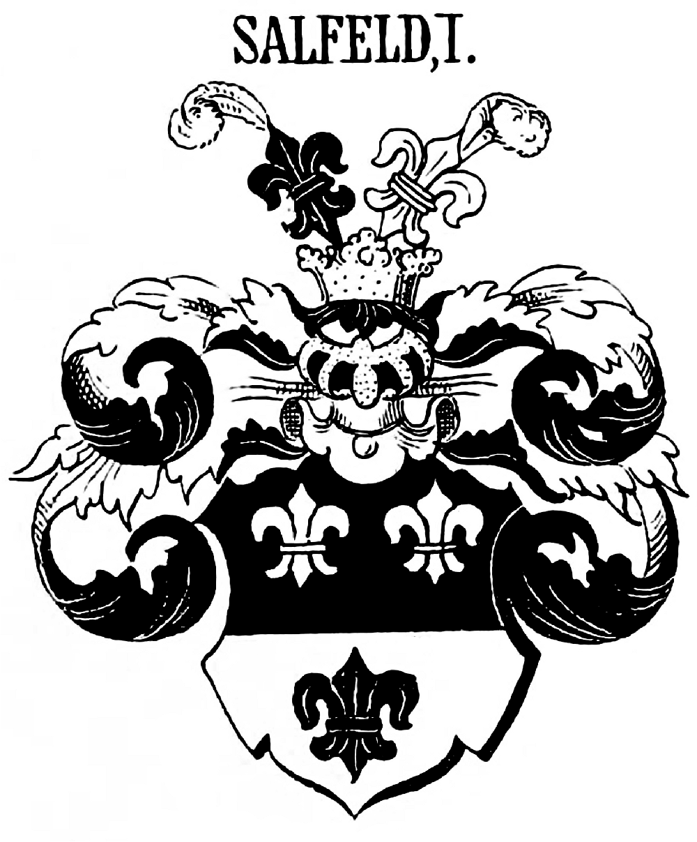 Wappen derer von Salfeld I.